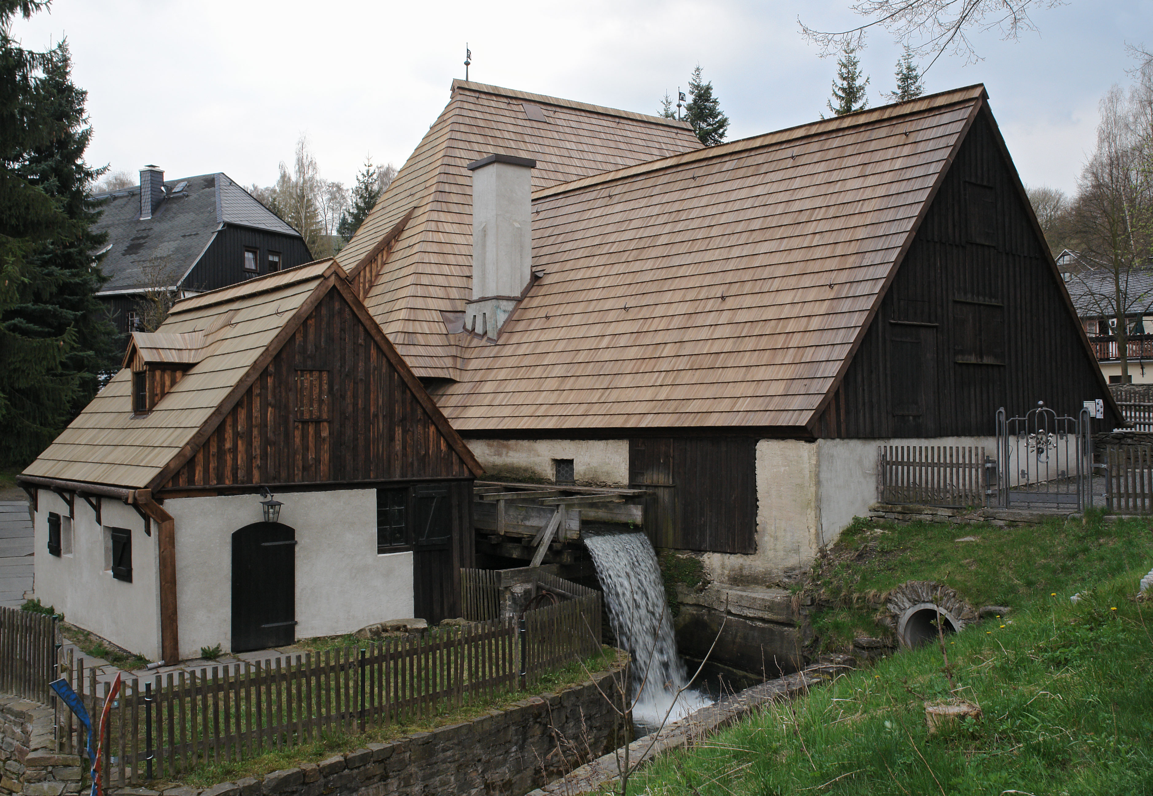 Frohnauer Hammer, historische Hammerschmiede mit neuer Schindeldeckung